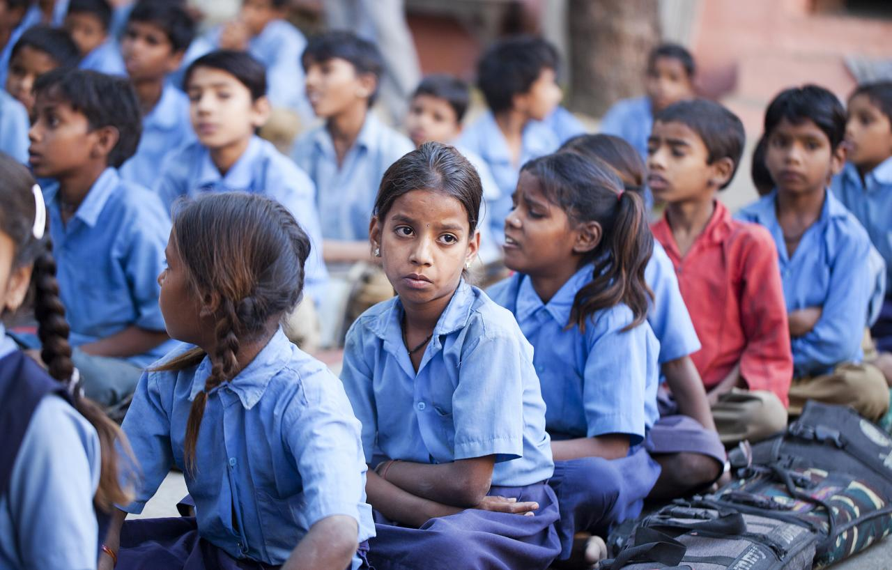 rajasthan